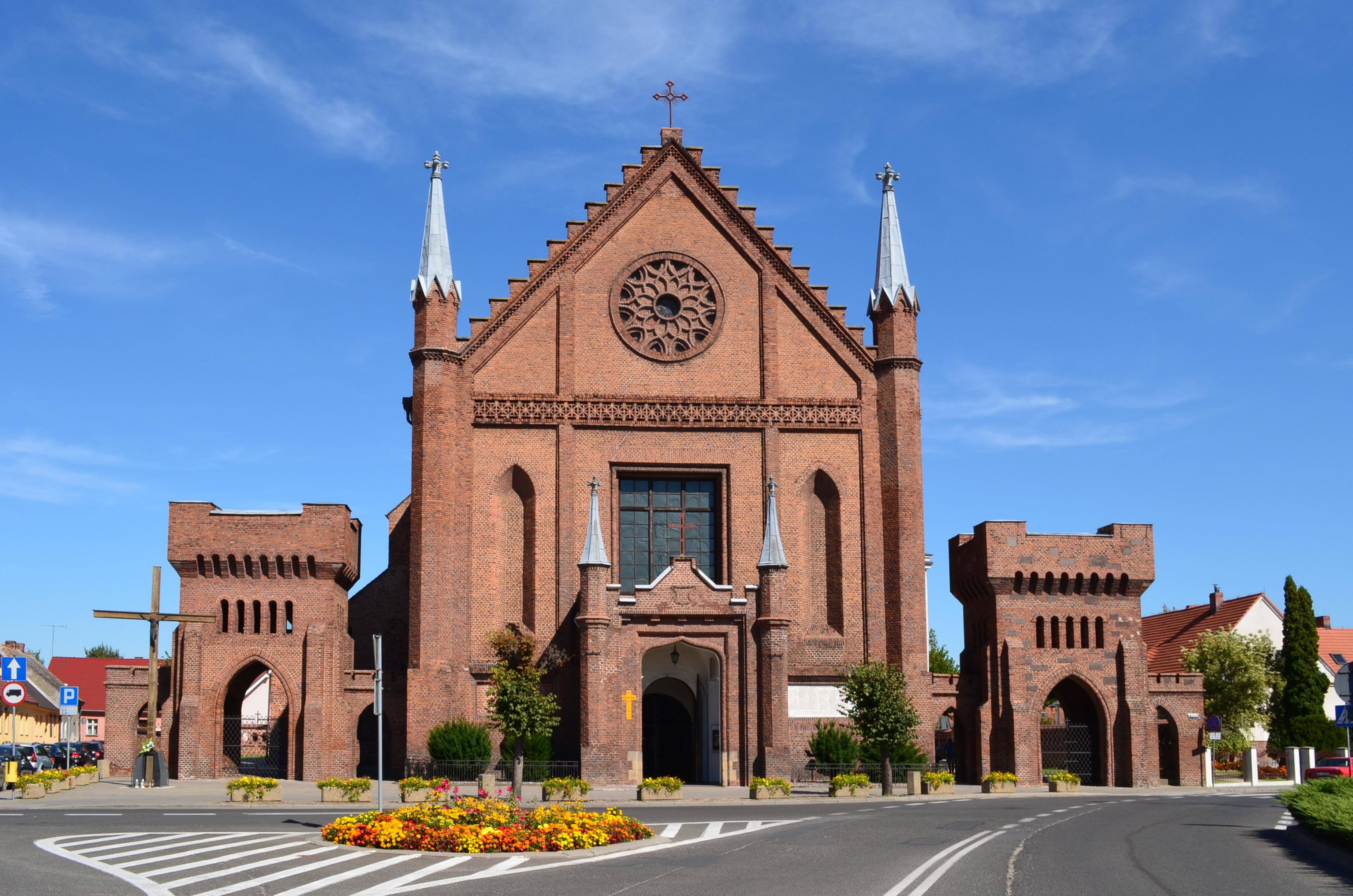 Kórnik, zespół kościoła par. p.w. Wszystkich Świętych